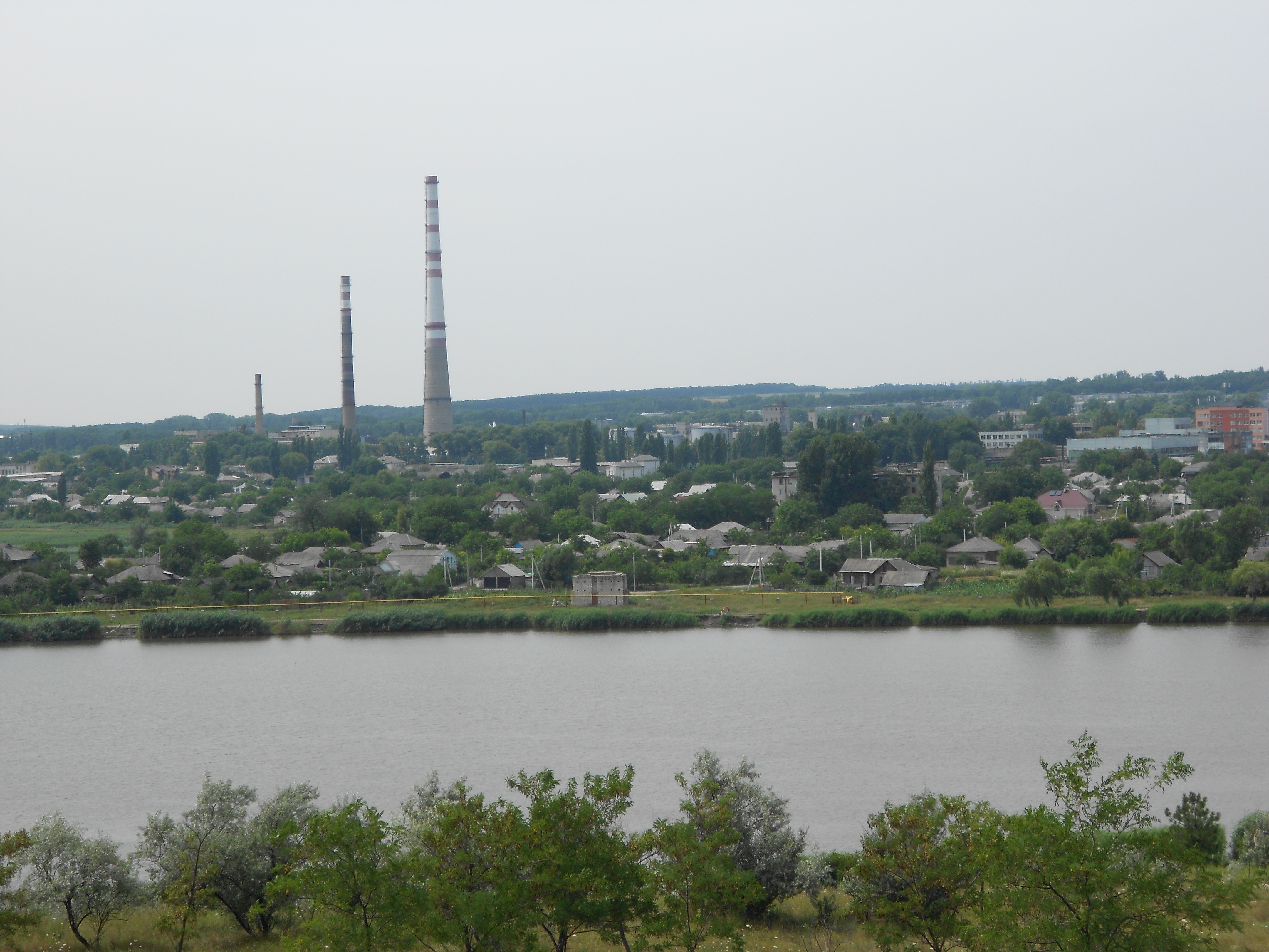 Cartierul Teioasa din Bălți